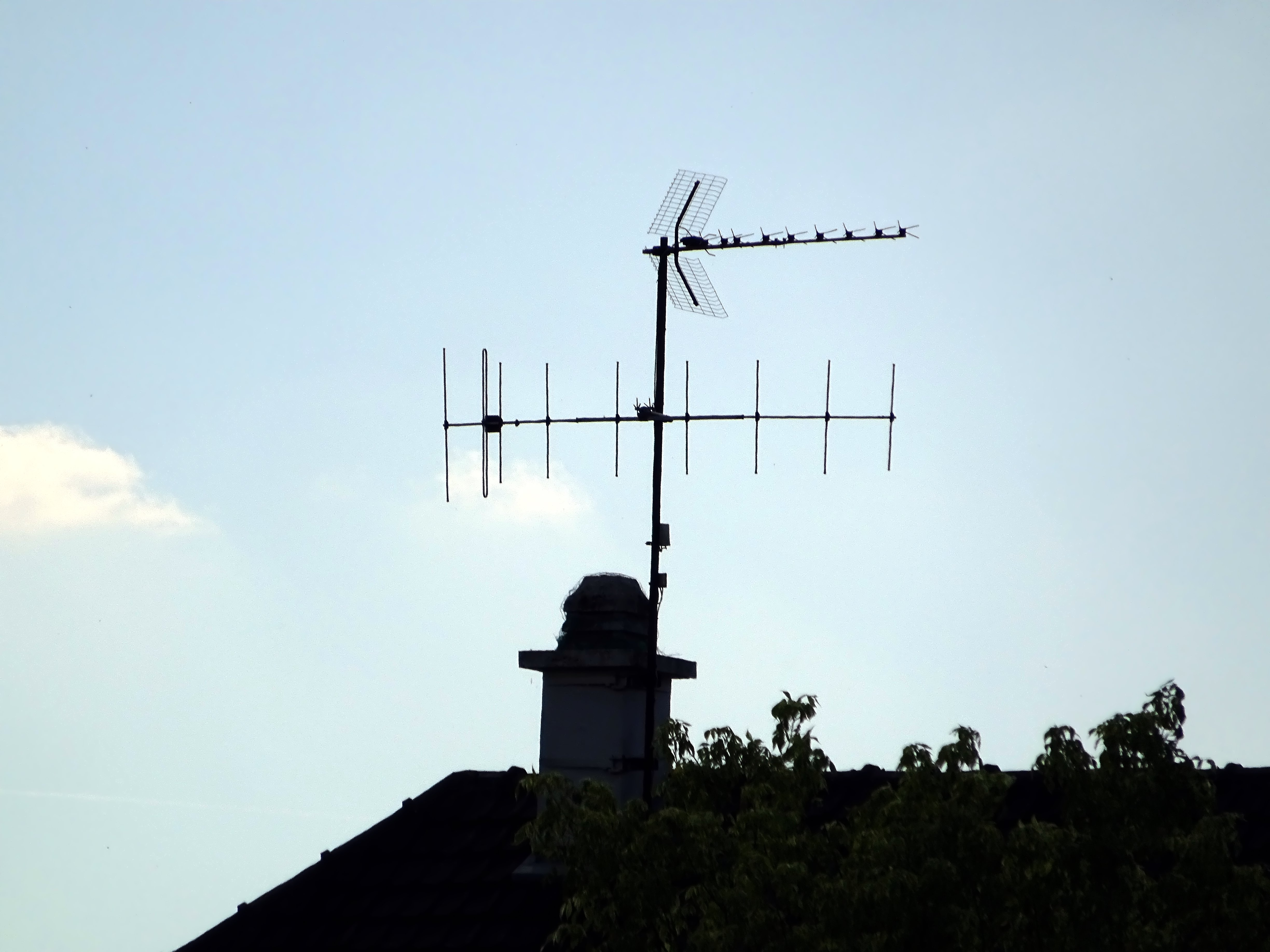 Antennes UHF et VHF "Canal Plus" en France.